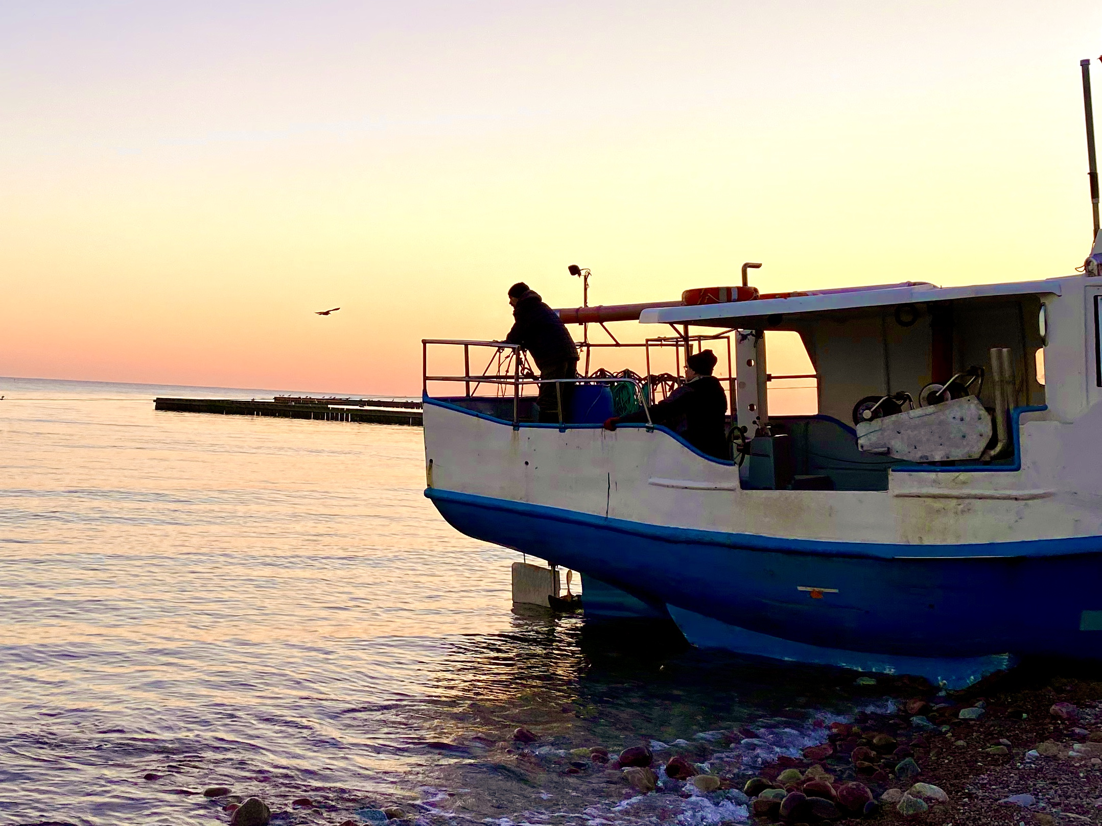 Wschód słońca na przystani rybackiej.